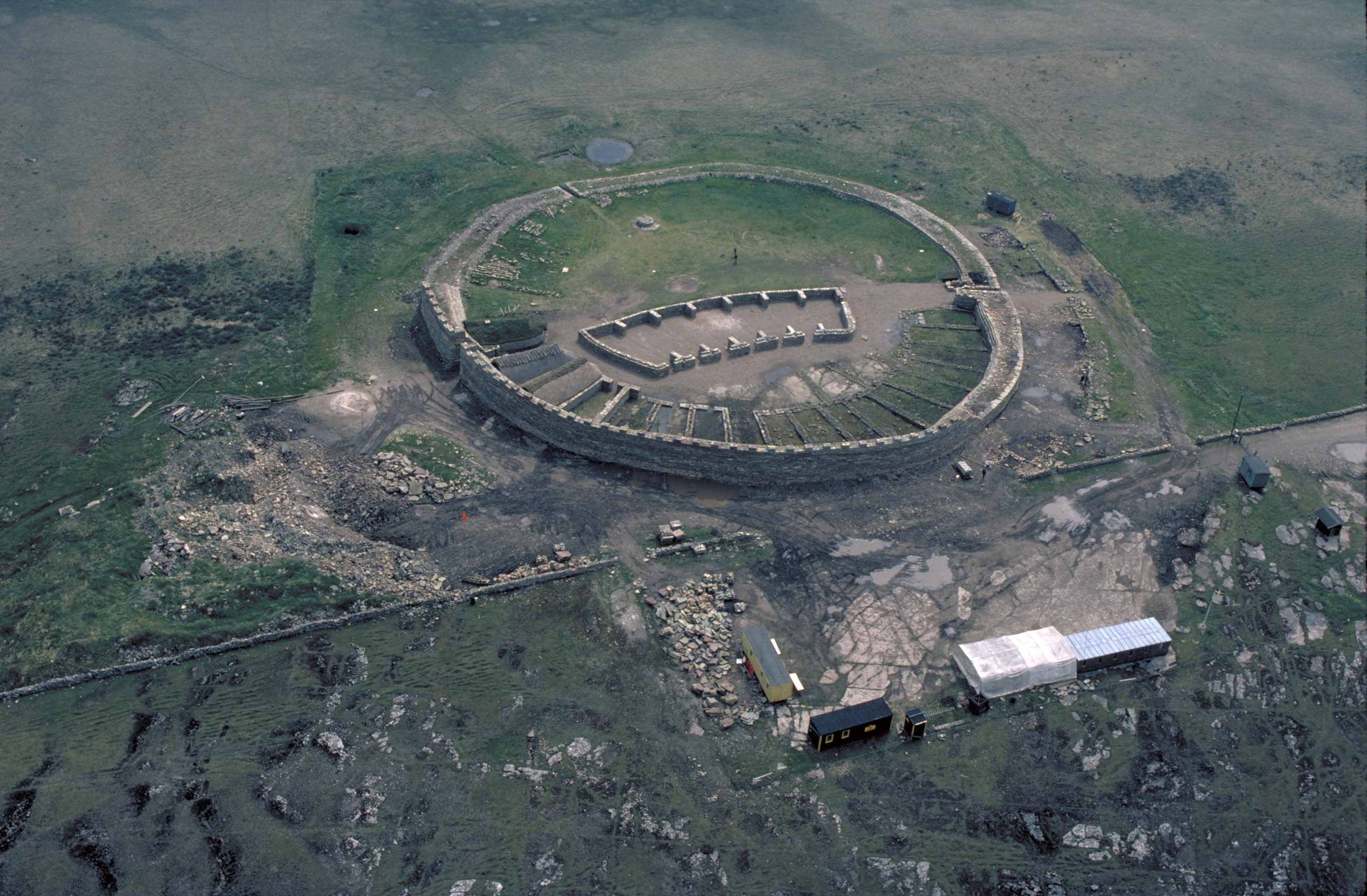 Bilden troligen från mitten av 1970-talet. Motiv: Eketorps borg Nyckelord: Flygbilder, Raä-Fastigheter, Riksintressen, Världsarv Kategori: Fornborg Bilden troligen från mitten av 1970-talet.